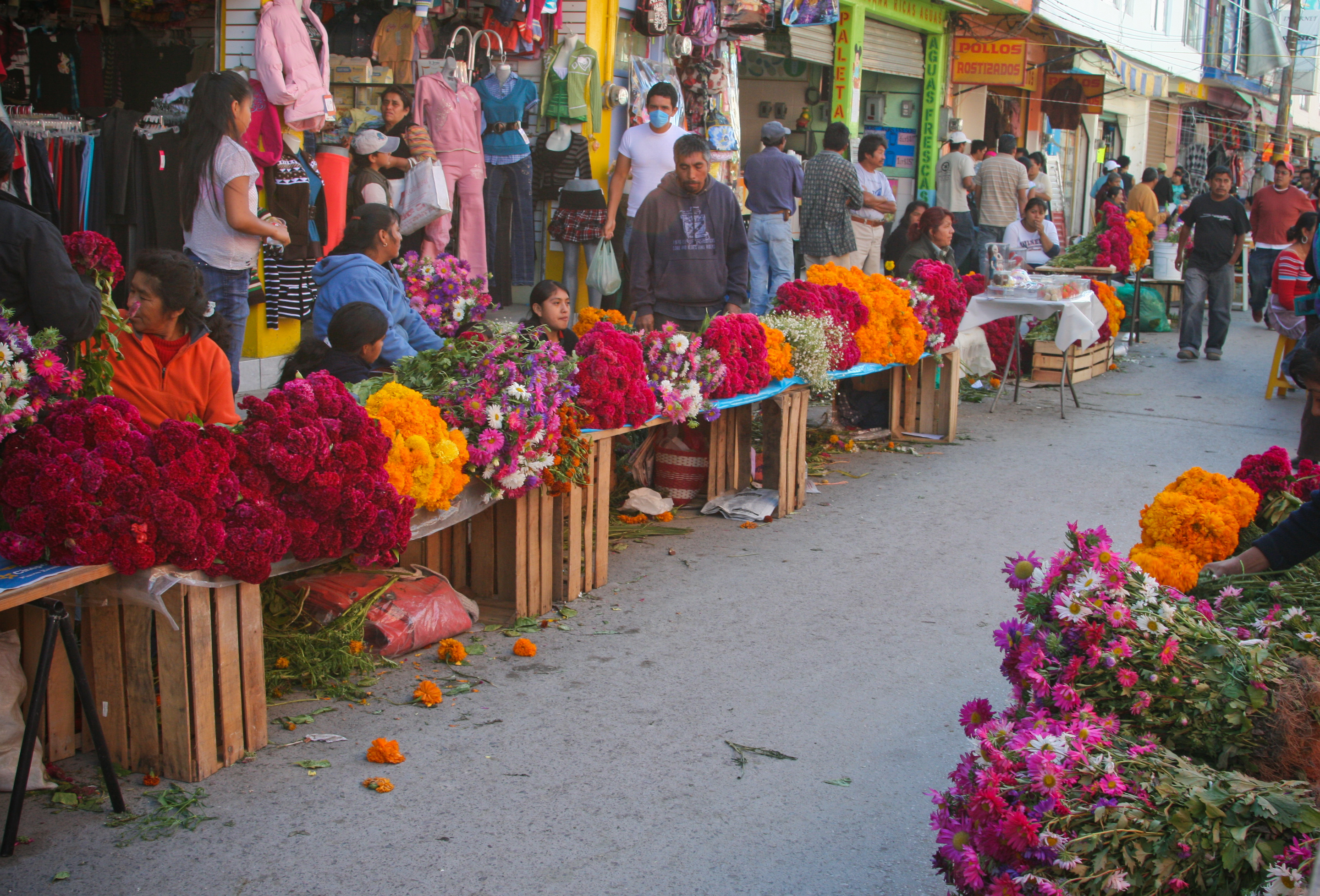 Un camino termina. En las flores abandonamos el camino de los muertos.